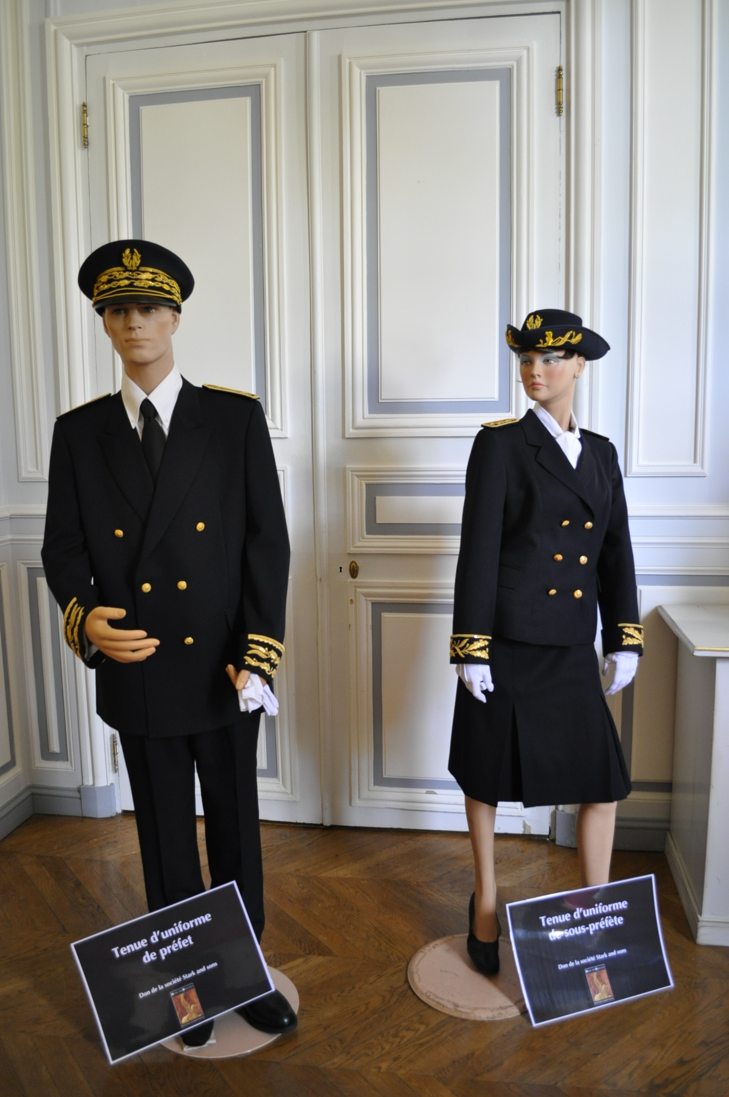 Tenue d’un uniforme de préfet et de sous-préfète. exposition « Les uniformes des préfets au XIXe siècle et aujourd'hui » à l’hôtel de Beauvau (ministère de l'Intérieur) à l’occasion des journées européennes du patrimoine de 2013.